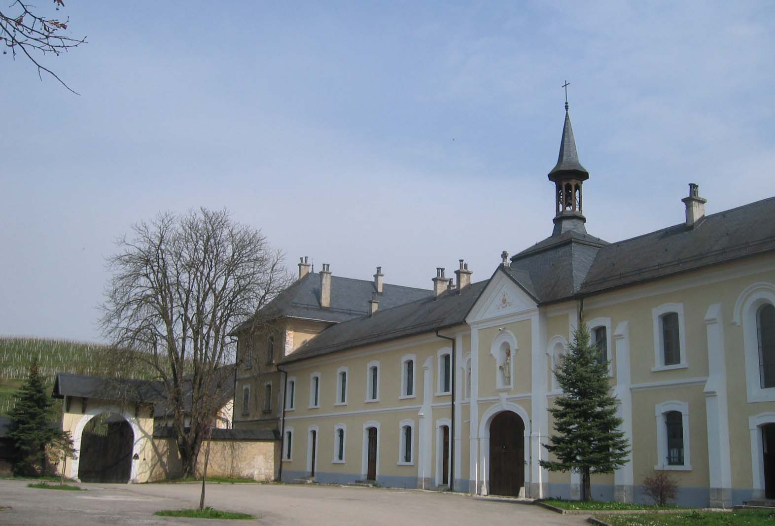 Pleterje, monastery in Slovenia photo:Ziga 08:08, 2 April 2007 (UTC)